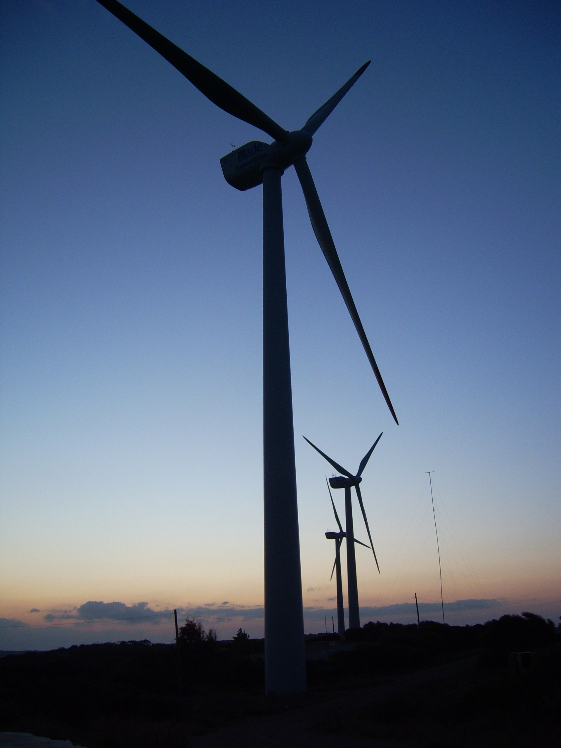 Es Milà Wind farm, Menorca.